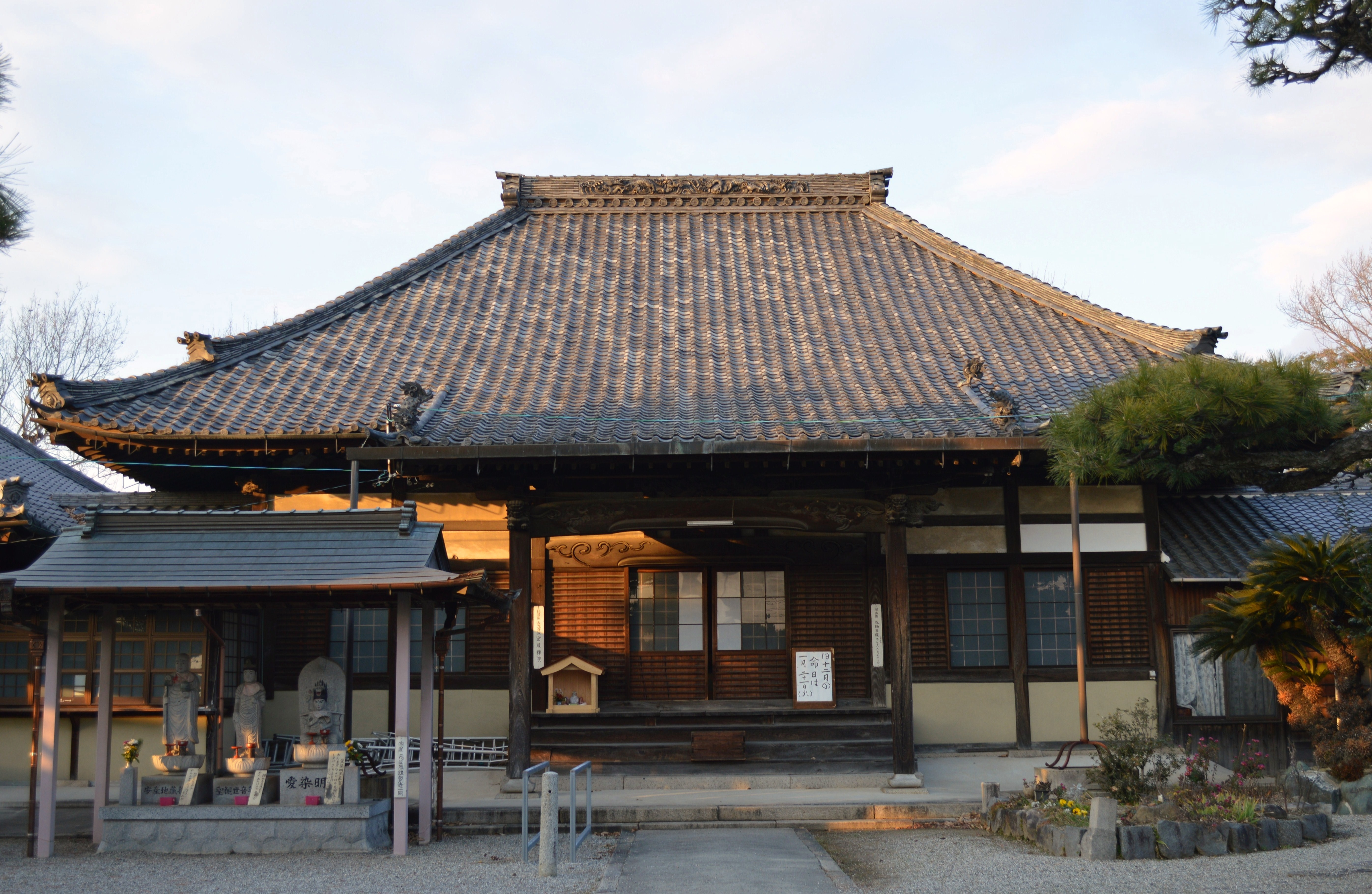 愛知県刈谷市一里山町にある寺院「密蔵院」